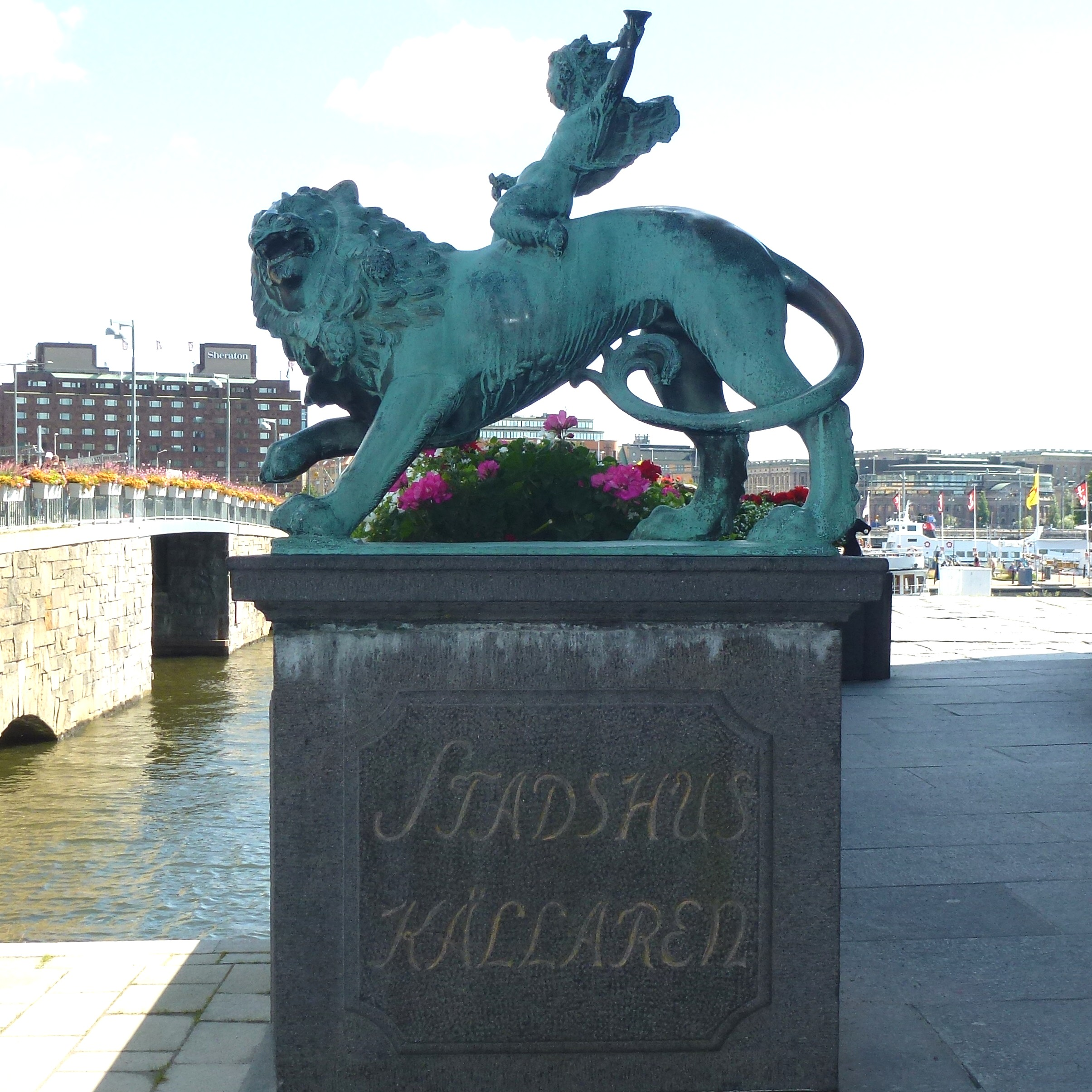 Baccus ridande på lejon utanför Stadshuskällaren, skulptör Ansgar Almquist